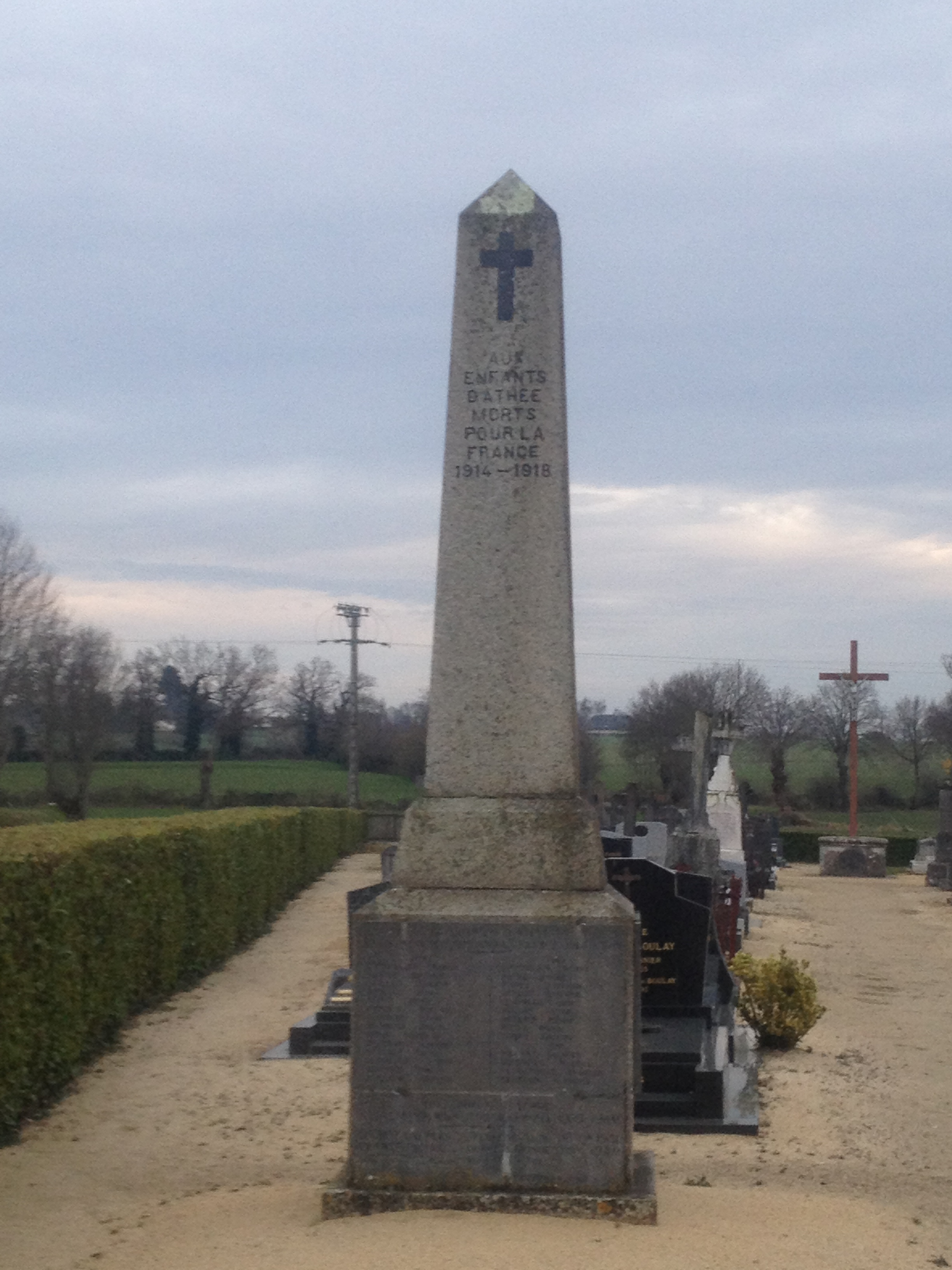 Mayenne, France